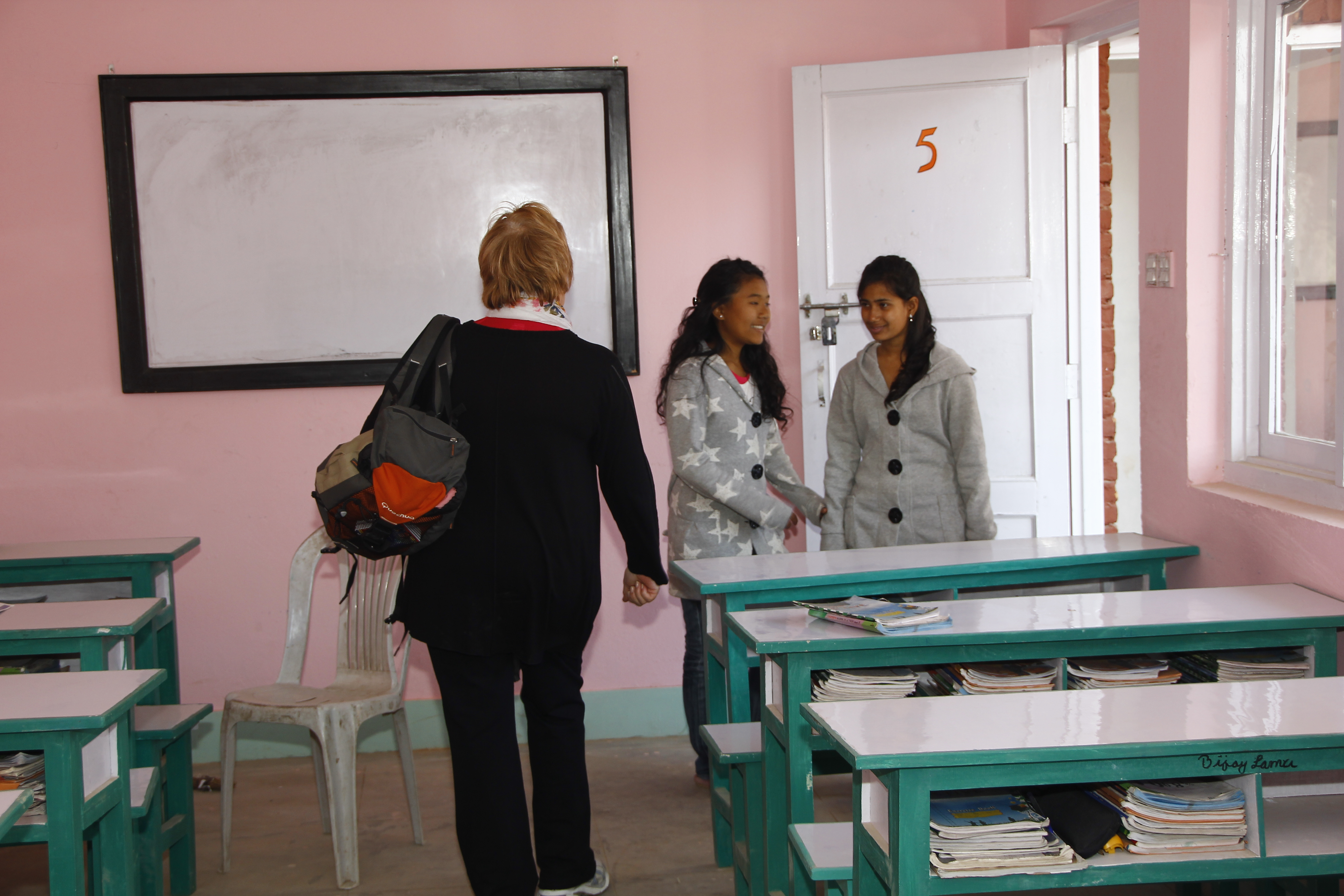 Ecole Chantal Mauduit Nepal